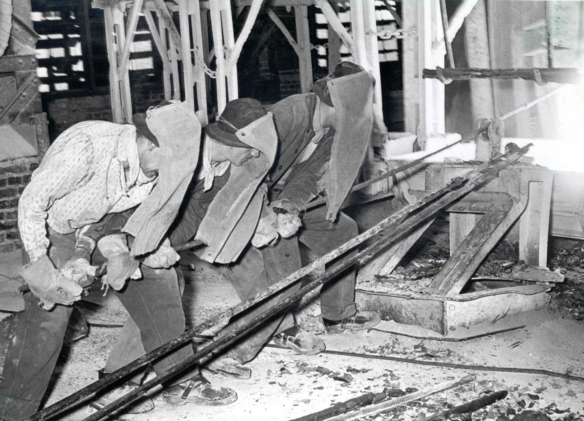 Carbidabstich; Aktien-Gesellschaft für Stickstoffdünger in Knapsack -heute Chemiepark Knapsack, Huerth, Germany